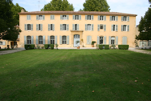 Bastide du parc du CREPS PACA à Aix-en-Provence